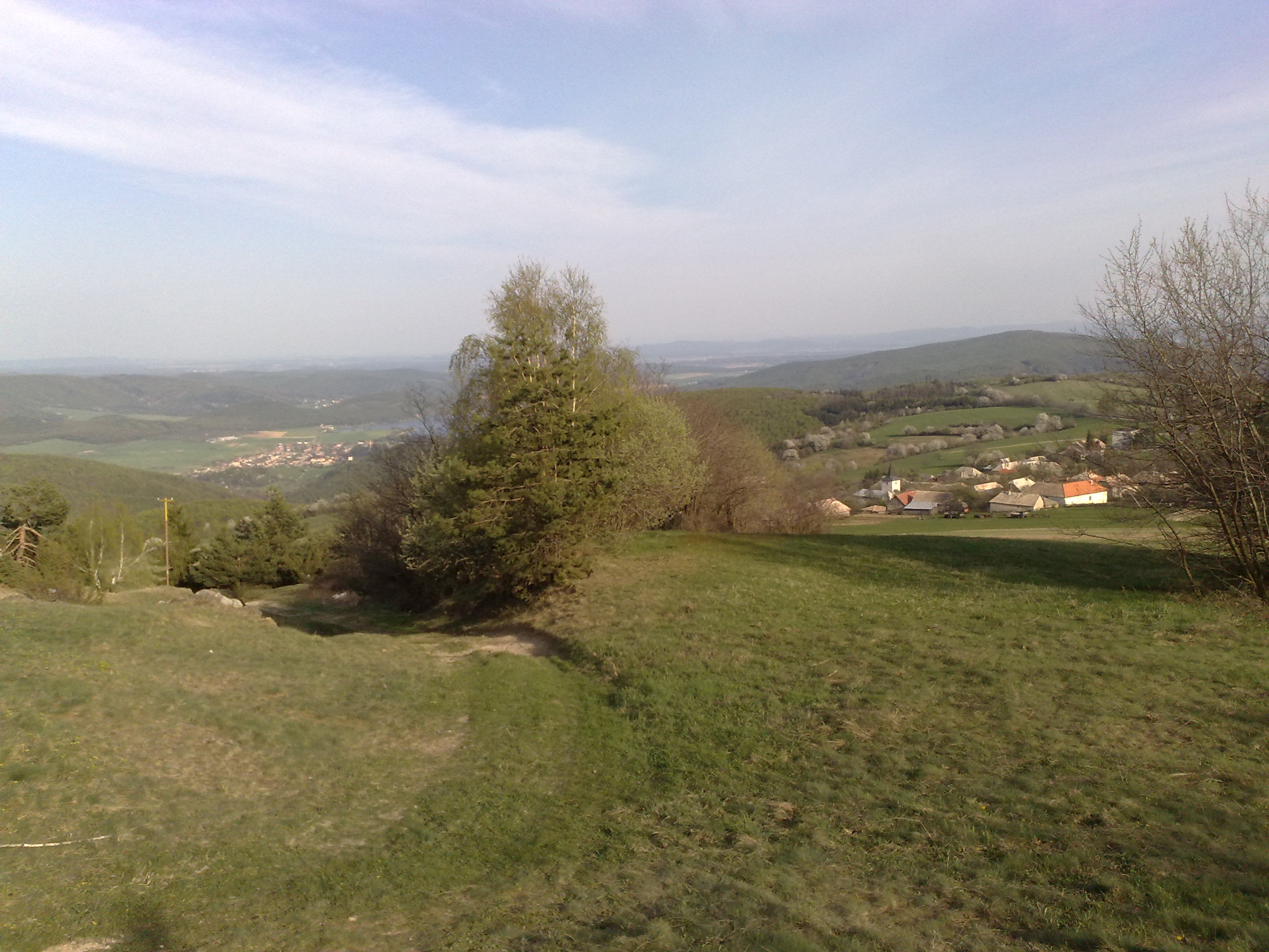 Pohľad na Budinú a Divín od pomníka